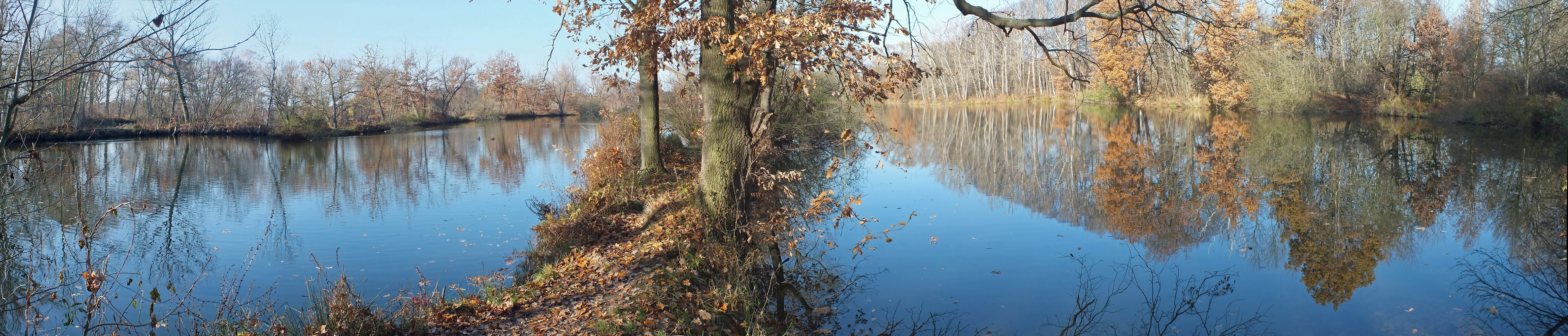 Panorama über zwei der drei Teilflächen des ehemaligen Fortunabades in Leipzig-Knautkleeberg